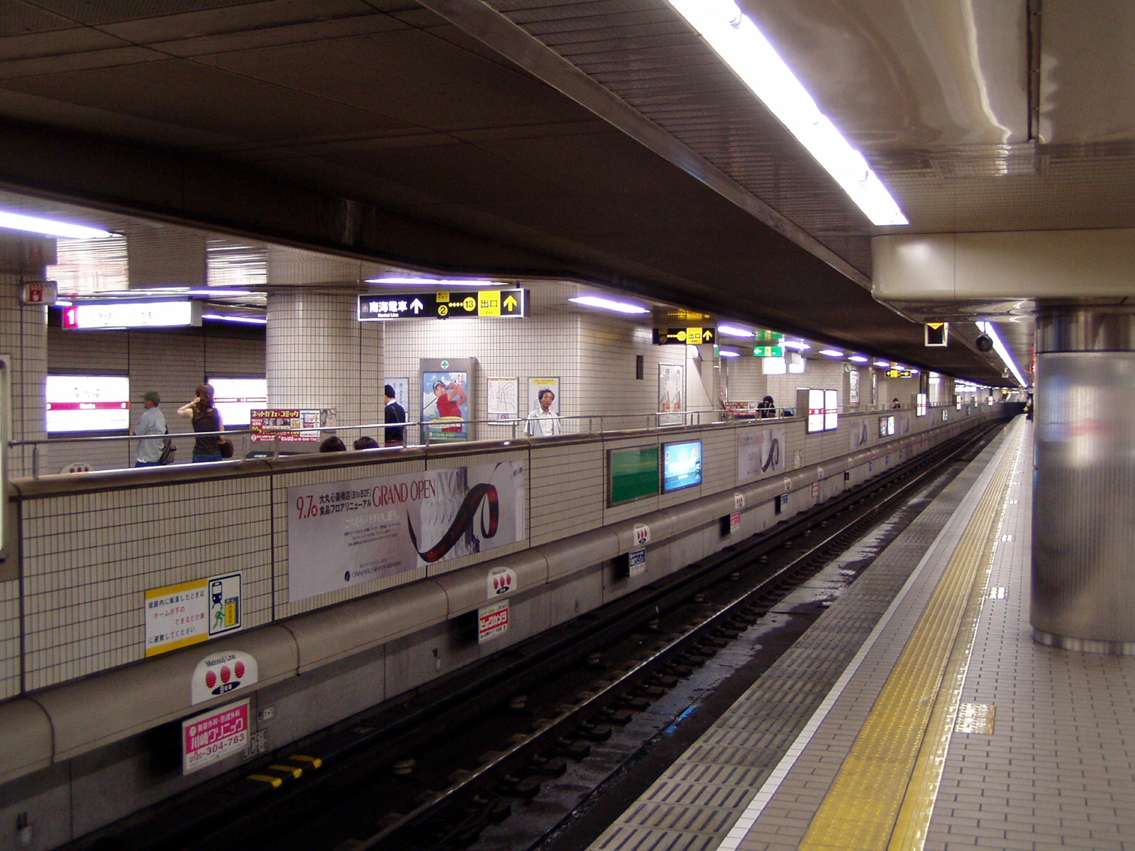 Osaka. Namba Station on metro Midosuji Line. 大阪市営地下鉄御堂筋線のなんば駅。